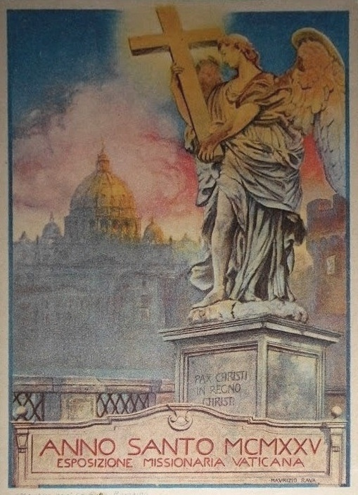 Cartolina Anno Santo 1925 Esposizione Missionaria Vaticana